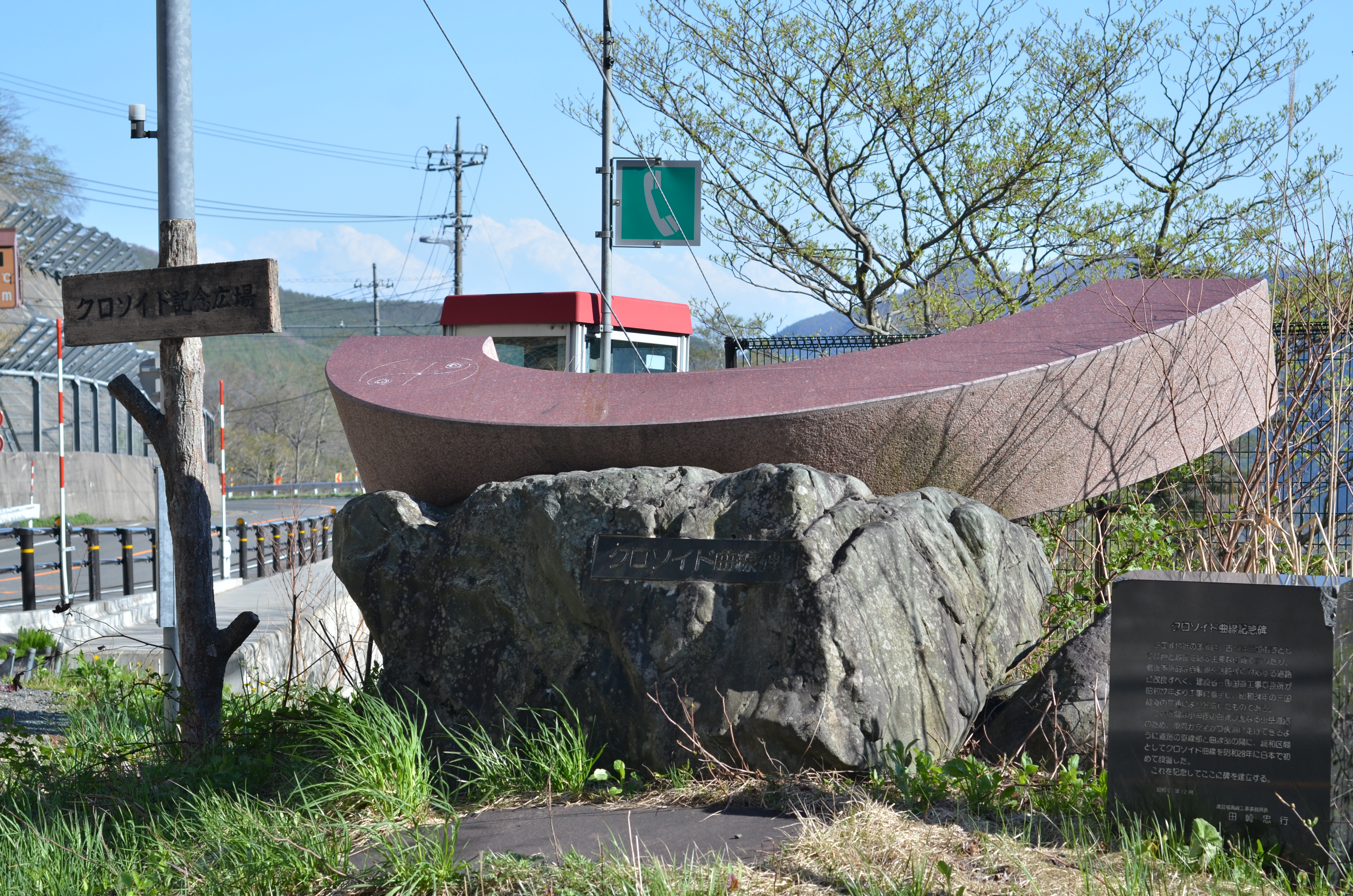 国道17に設置されたクロソイド曲線の記念碑